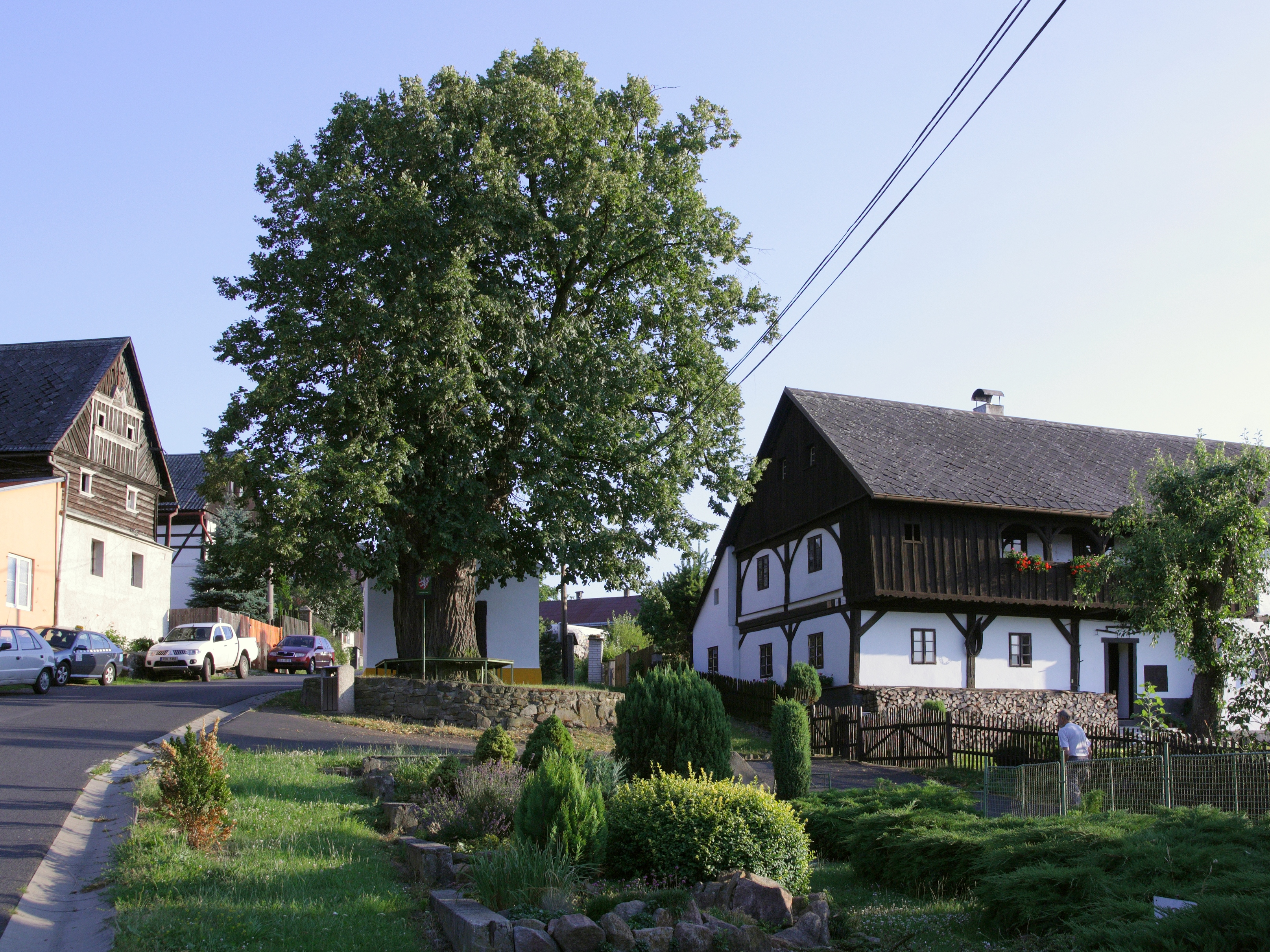 Nová Ves (Ústí nad Labem) - náves od severu.